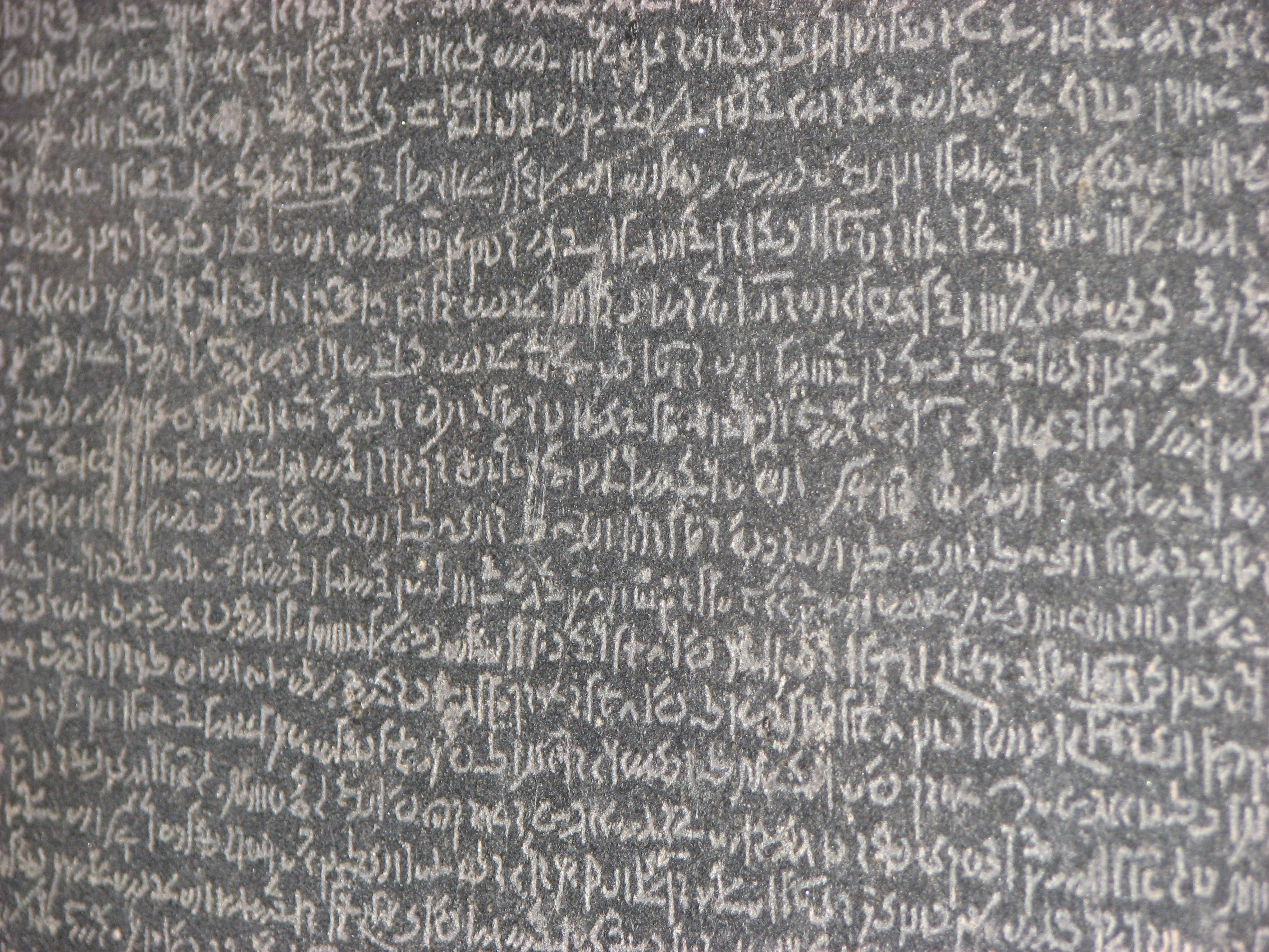 London - 2008